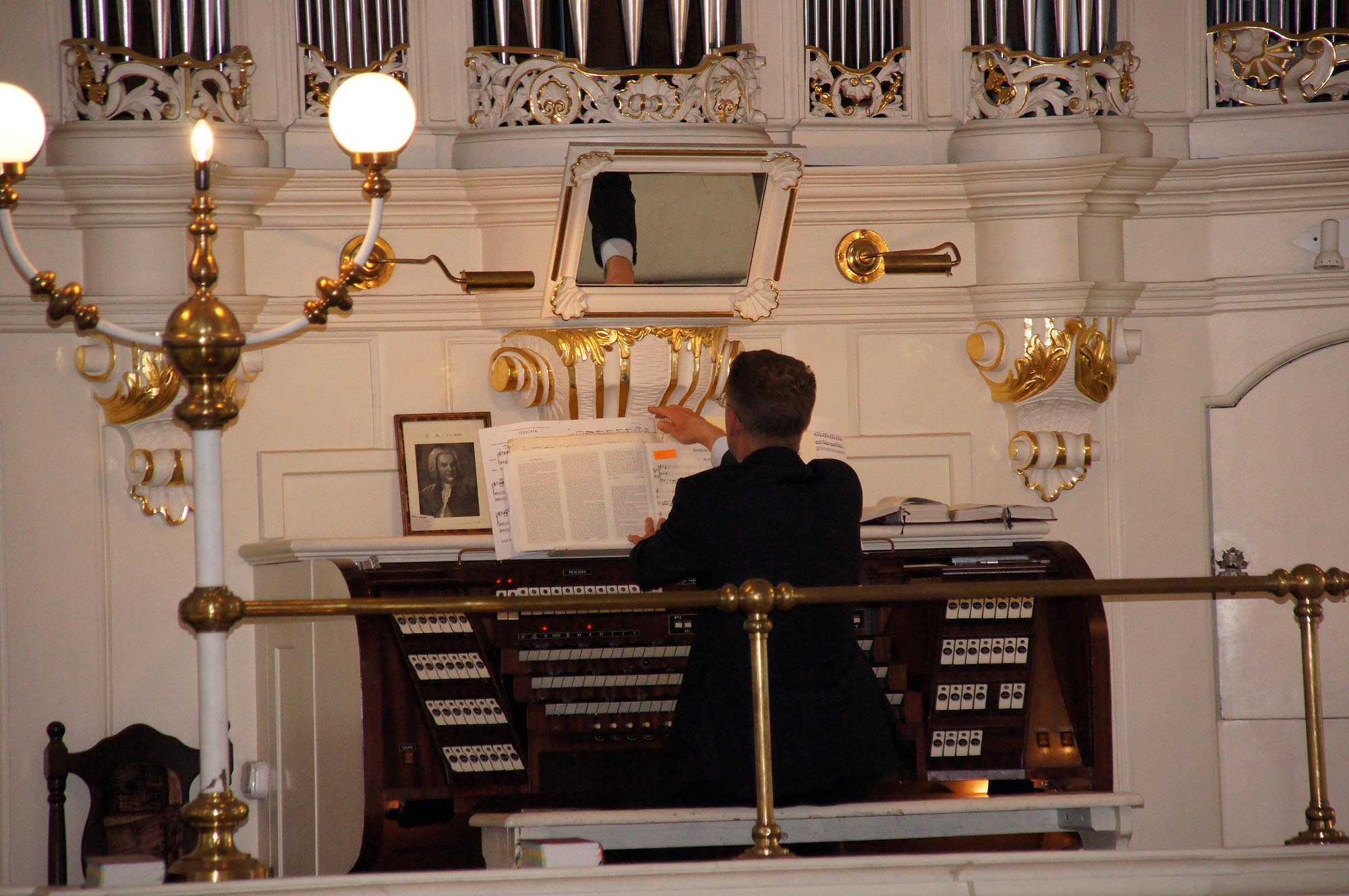 Wrocław, kościół ewangelicki p.w. Opatrzności Bożej, tzw. dworski, poł. XVIII